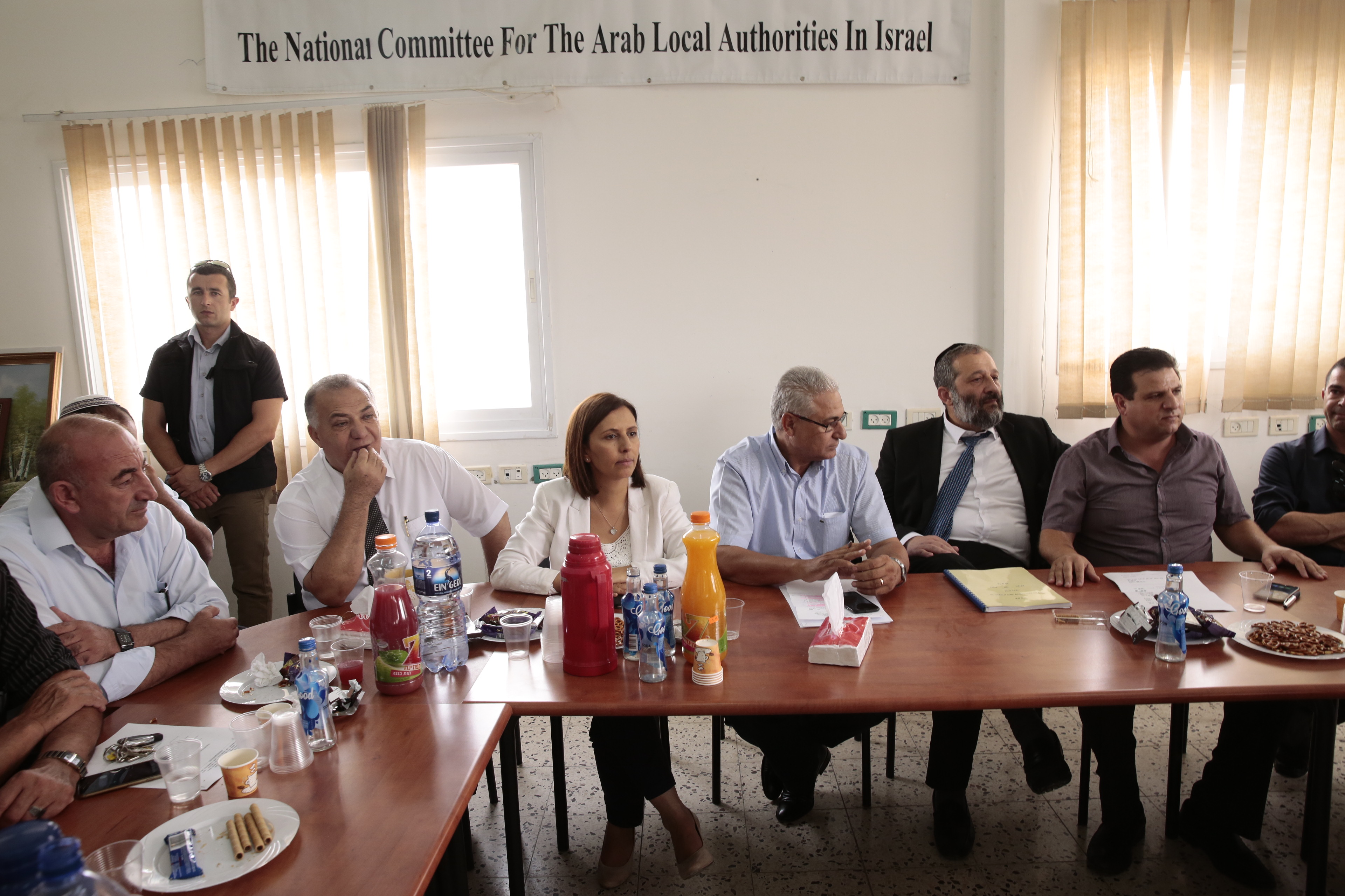 השר אריה דרעי והשרה גילה גמליאל וח"כ איימן עודה בפגישת עבודת בנצרת